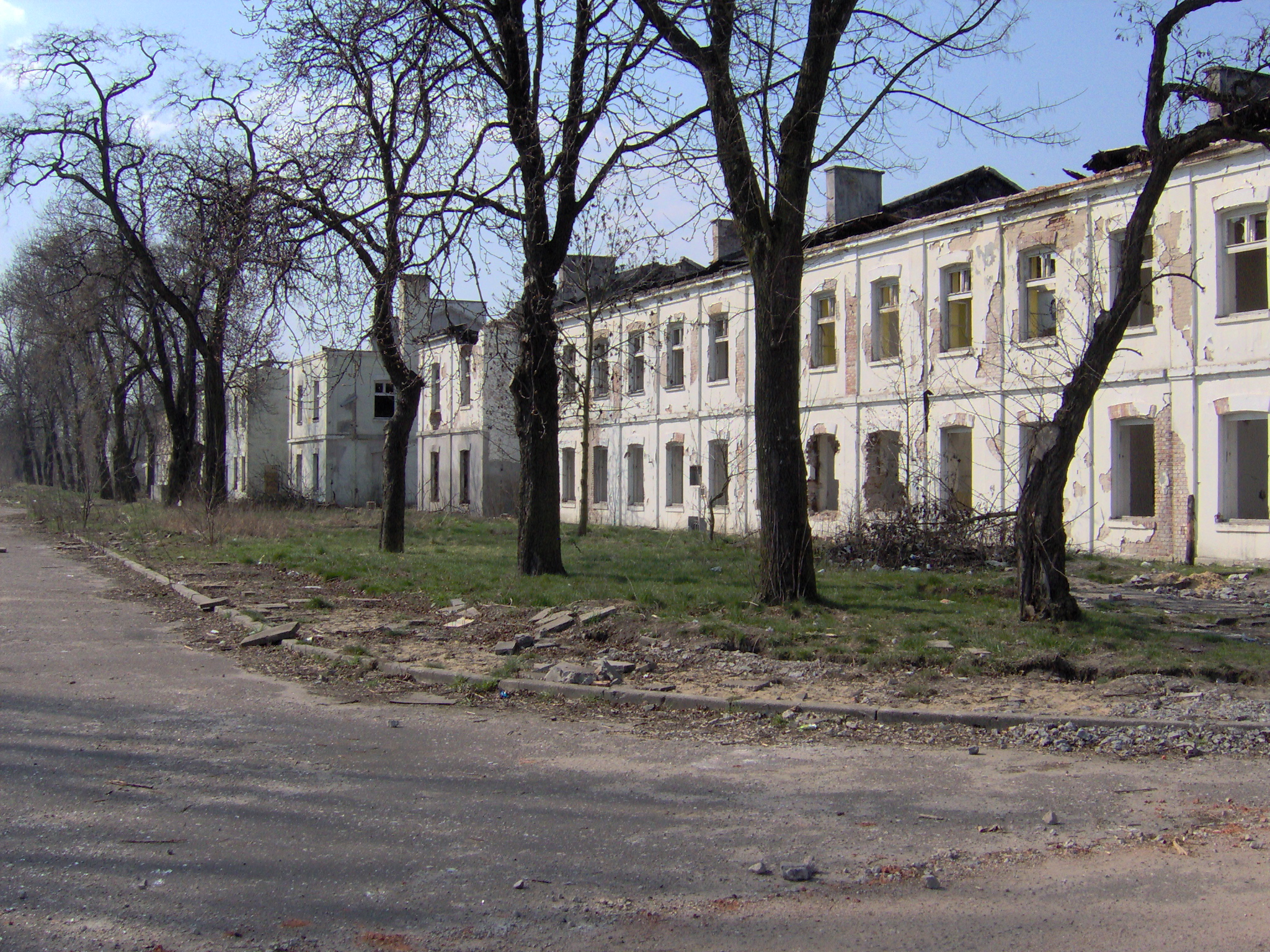 Pozostałości po byłej jednostki wojskowej przy ul. Żytniej 83 (2007 r.)